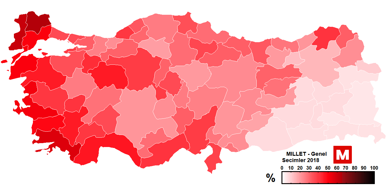 Stimmenanteil der "Bündnis der Nation" bei der Parlamentswahl 2018 in der Türkei